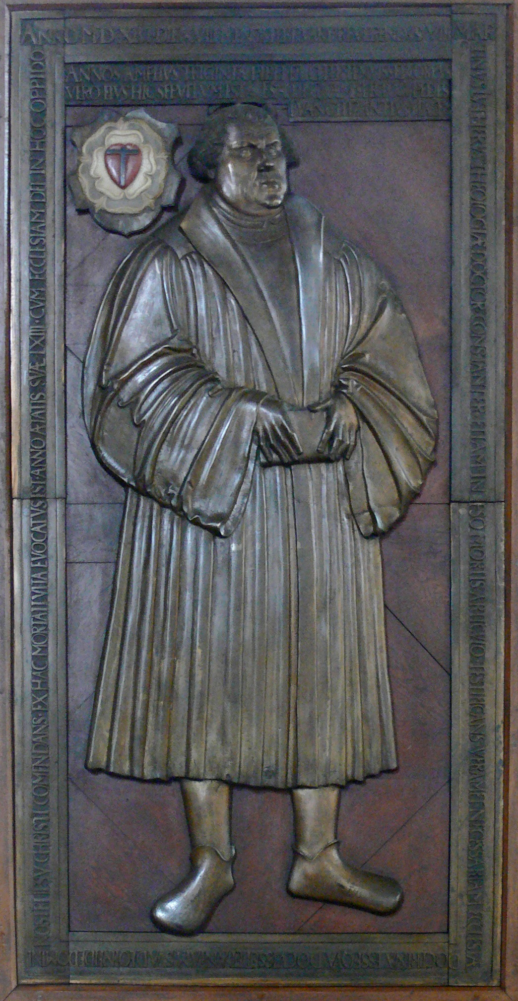 Jena, Stadtkirche St. Michael Die Grabplatte Luthers, Bronze, 1549 vom Erfurter Glockengießer Heinrich Ziegler nach einer Bildvorlage von Lucas Cranach d. Ä. gefertigt, war ursprünglich zur Aufstellung in der Wittenberg bestimmt.